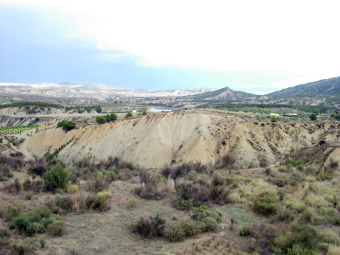 Vista de los barrancos de Gebas,Murcia, España